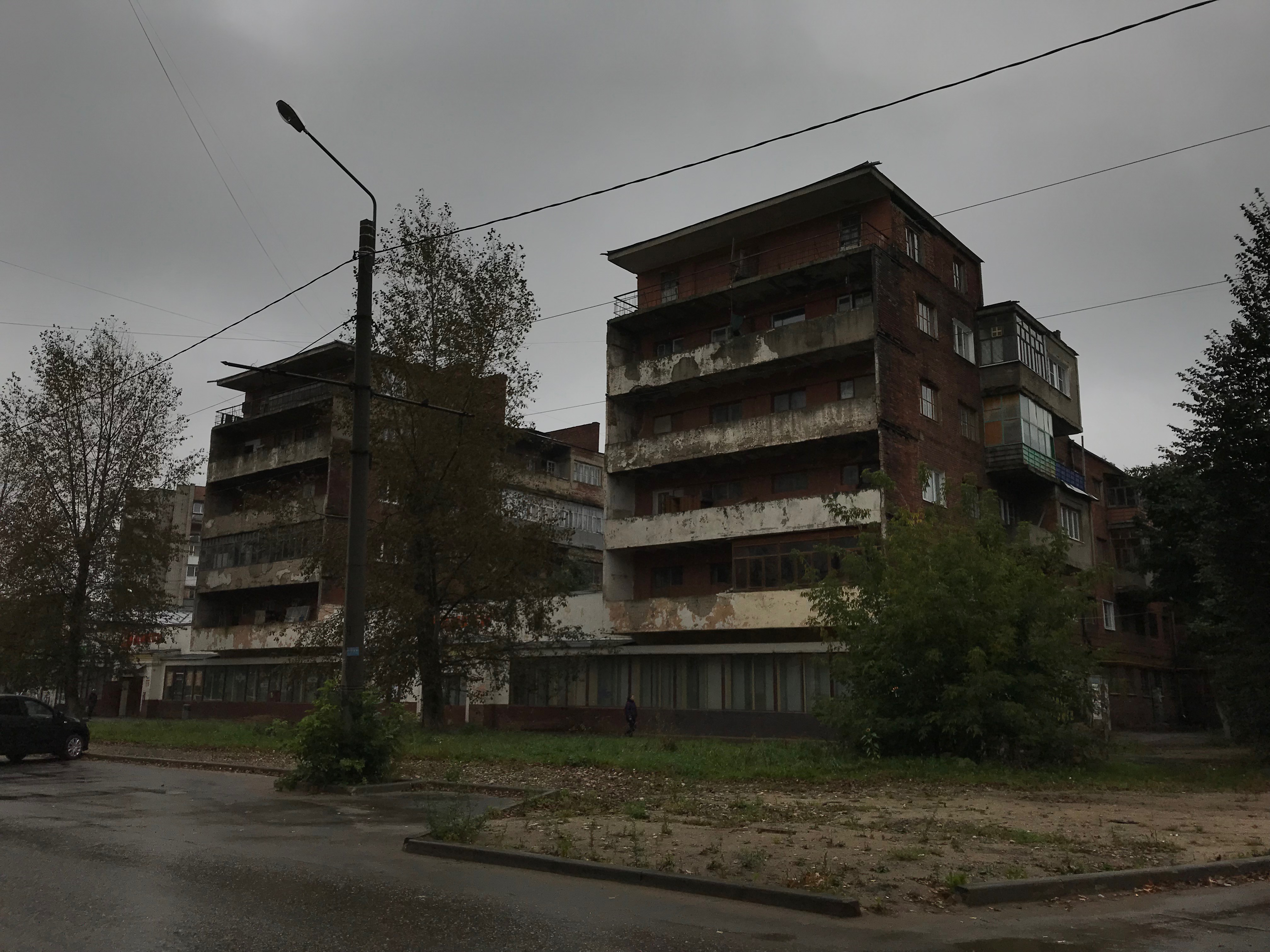 Фотография левой части здания от 29 сентября 2017 года